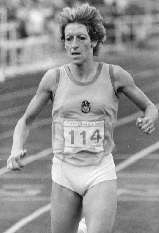 Ulrike Bruns ADN-ZB Kluge 6.5.84 Potsdam: DDR-Meisterschaften in der Leichtathletik- Ulrike Bruns (ASK Vorwärts Potsdam) verbesserte am 5.5.84 als neue DDR-Meisterin über 3.000 Meter mit 8:42,81 Minuten ihren eigenen Landesrekord aus dem Vorjahr um zwei Sekunden. Ulrike Bruns gewann auf dieser Strecke ihren vierten Meistertitel seit 1976.